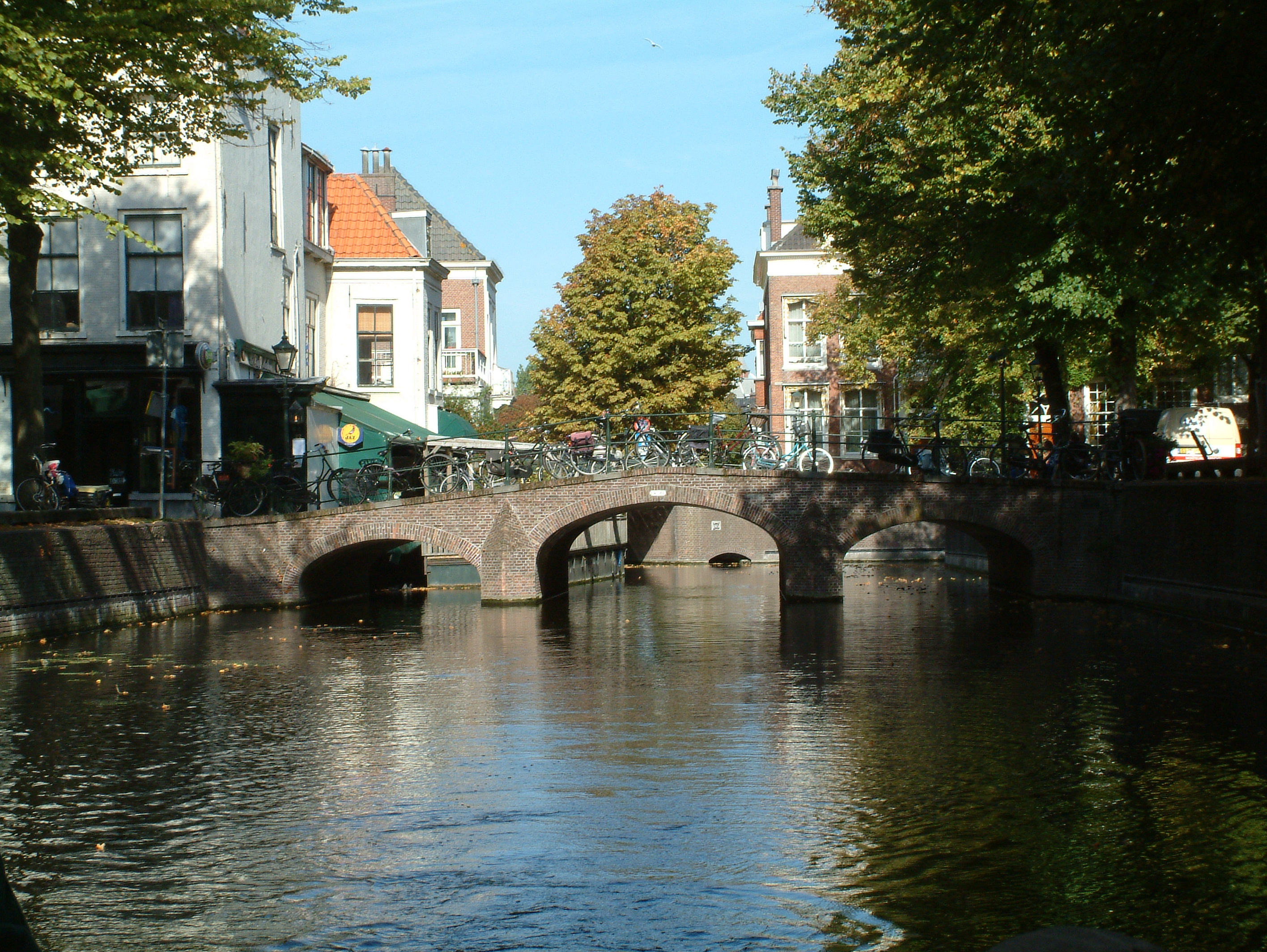 Brug in Den Haag